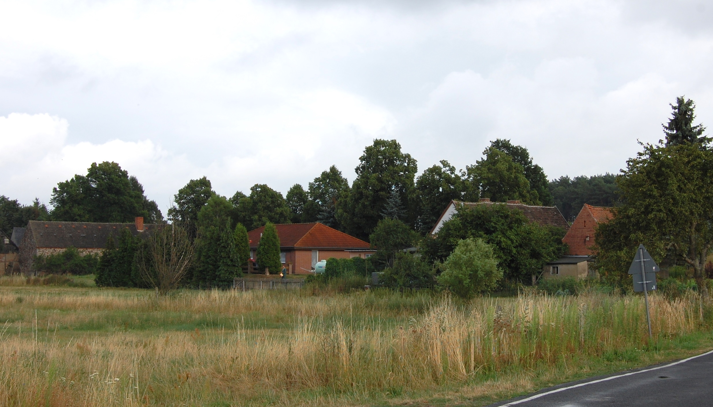 Blick auf Blätz, Ortsteil von Burgstall